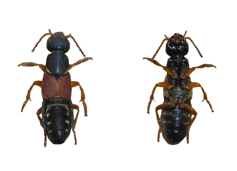 Vue dessus et dessous de Staphylinus caesareus